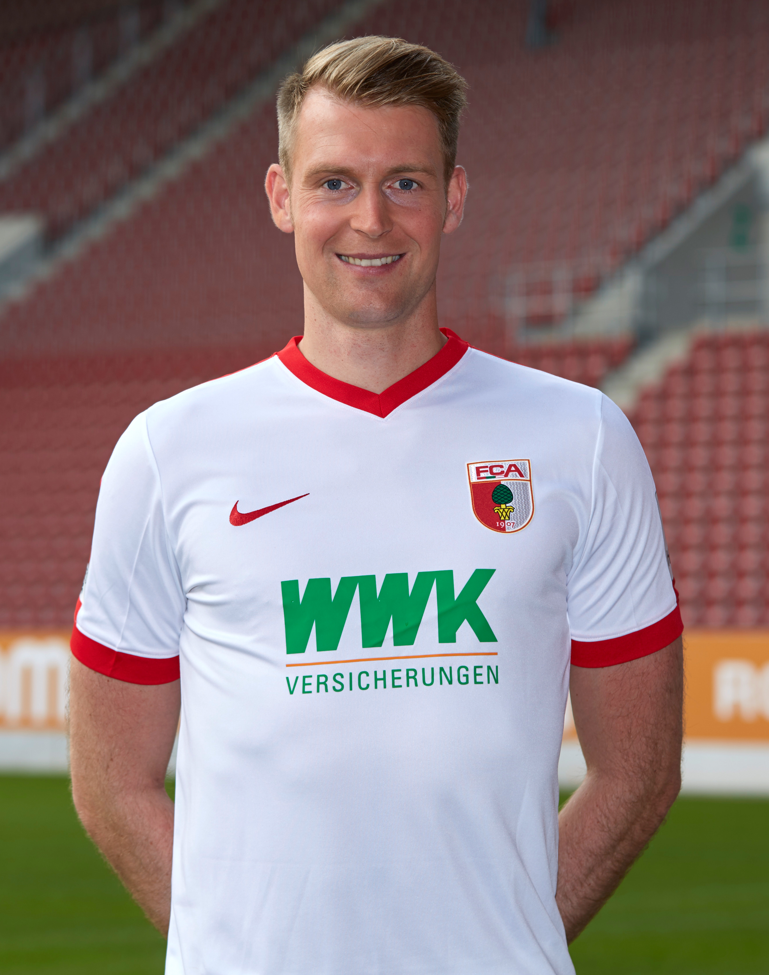 Jan-Ingwer Callsen-Bracker; Bundesliga-Profi aus dem Team des FC Augsburg